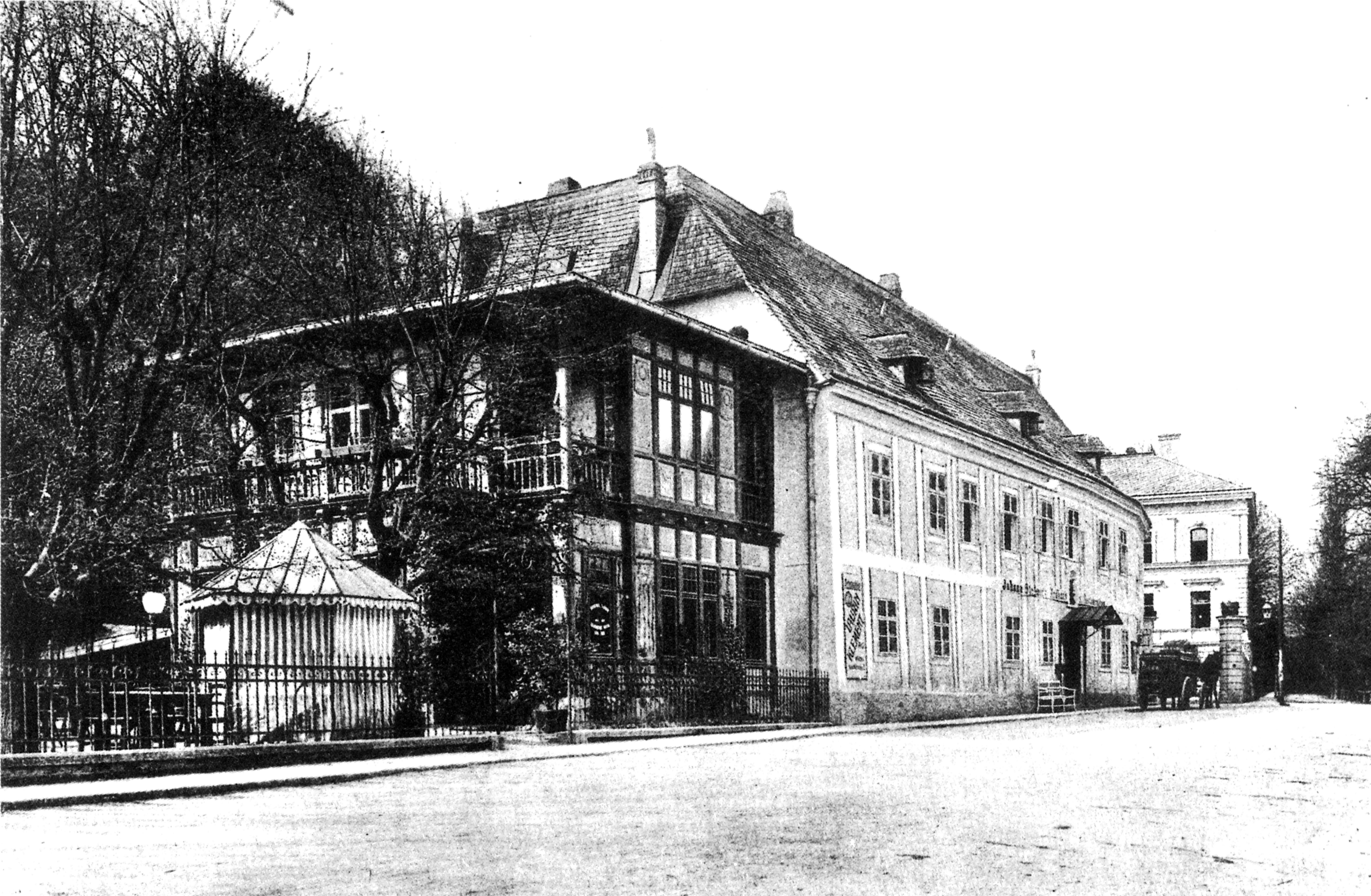 Gasthof Stelzer an der Ketzergasse, Rodaun, Wien-Liesing, damals wegen seiner Bekanntheit auch „Wirtshaus von Österreich“ genannt. Während des 1. Weltkriegs war das Gebäude Kriegspressequartier. Abgerissen 1960/61, heutiges Gebiet mit Wohnhäusern verbaut, ca. Ketzergasse Nr. 473